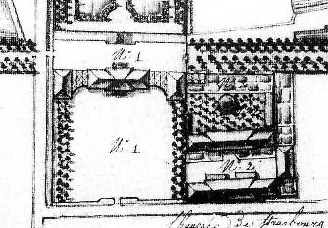 Planzeichung des elsässischen Schlosses Brumath